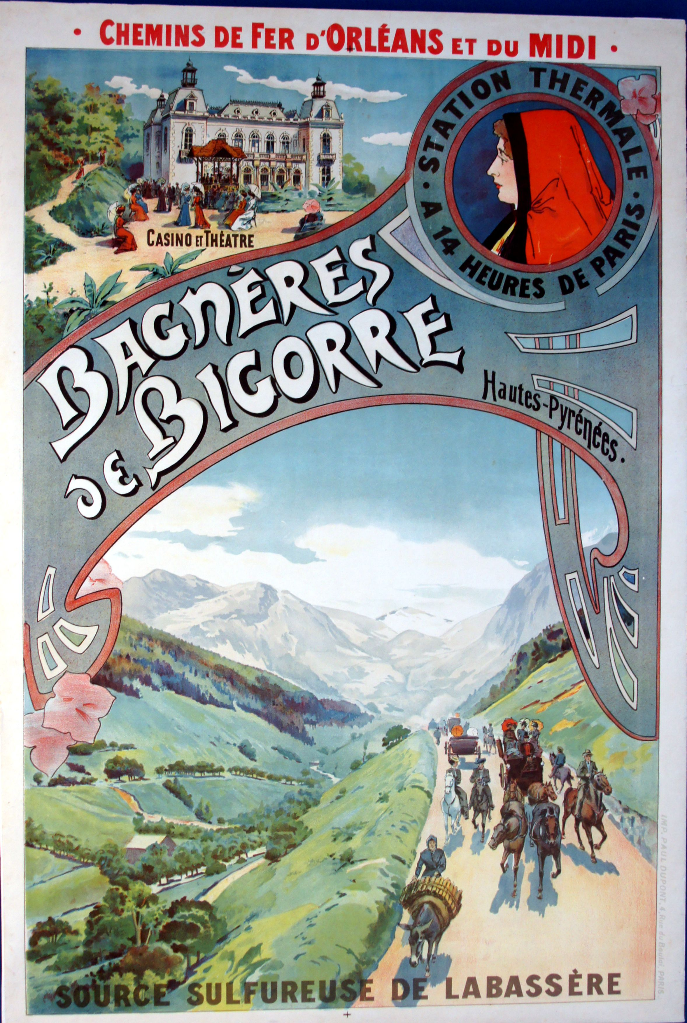 Bagneres de Bigorre, litografía